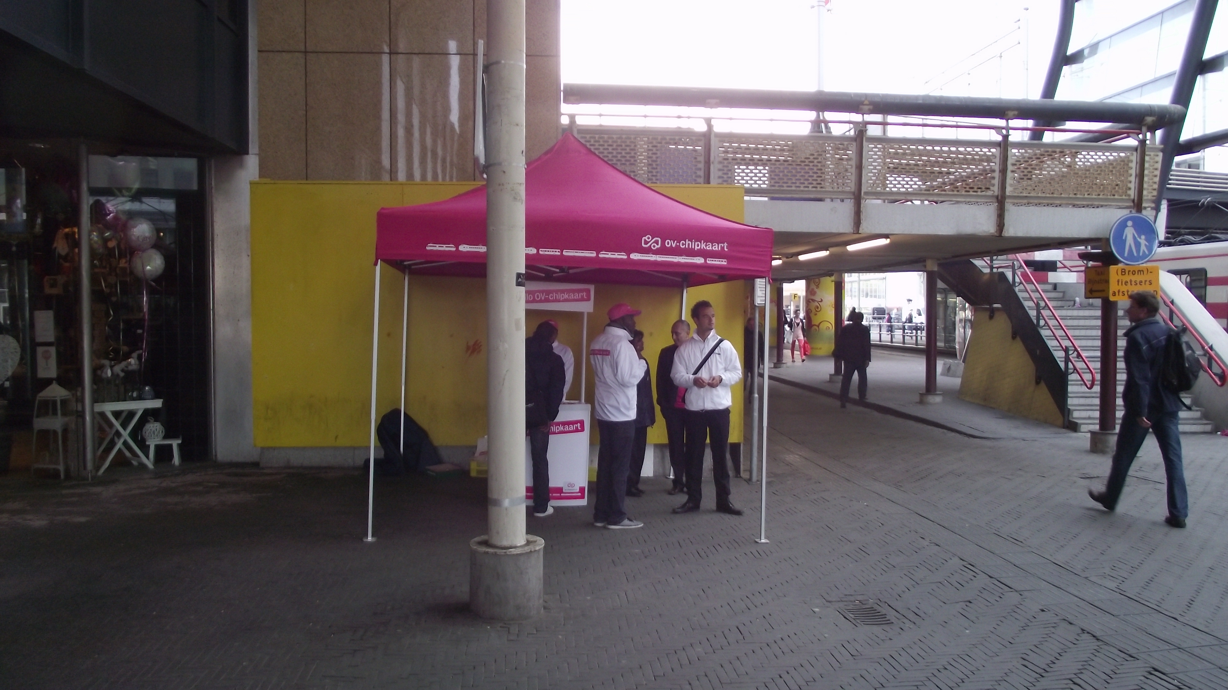 OV-chip promotietent in Den Haag